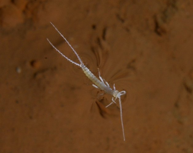 Plusiocampa tombé dans un gour.